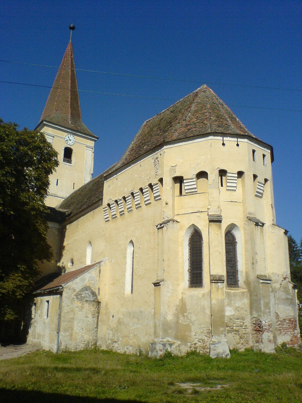 evangelische Kirche Großscheuern